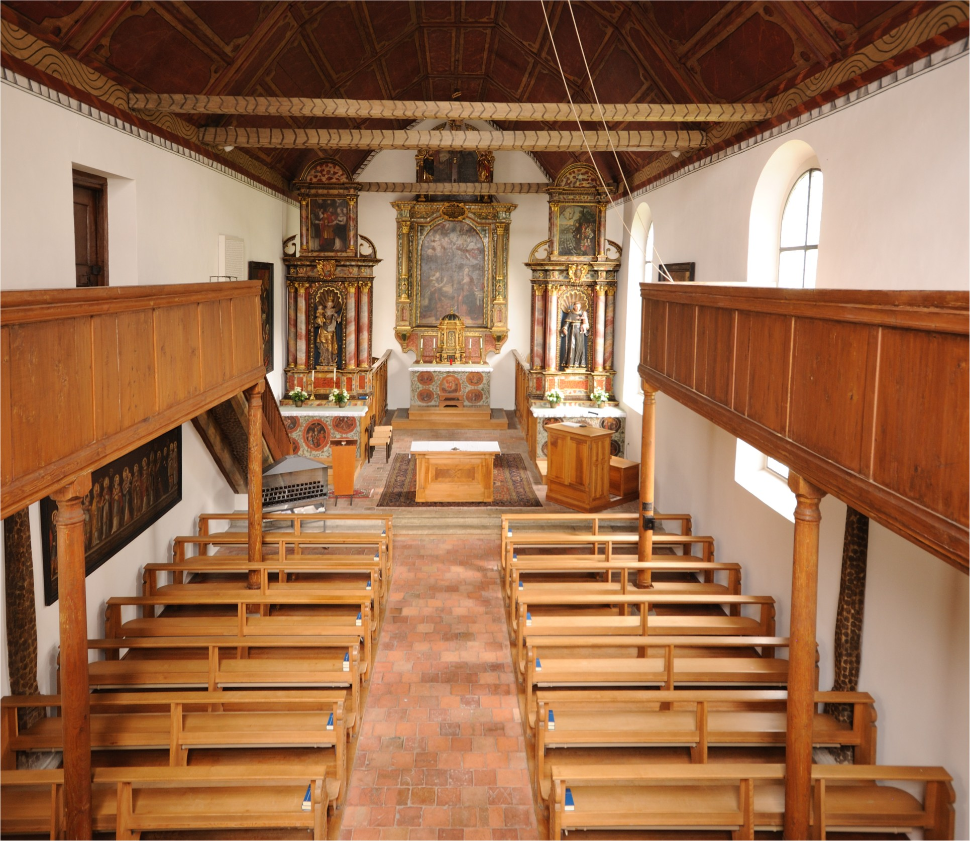 Bremgarten: Innenansicht der St. Klarakapelle